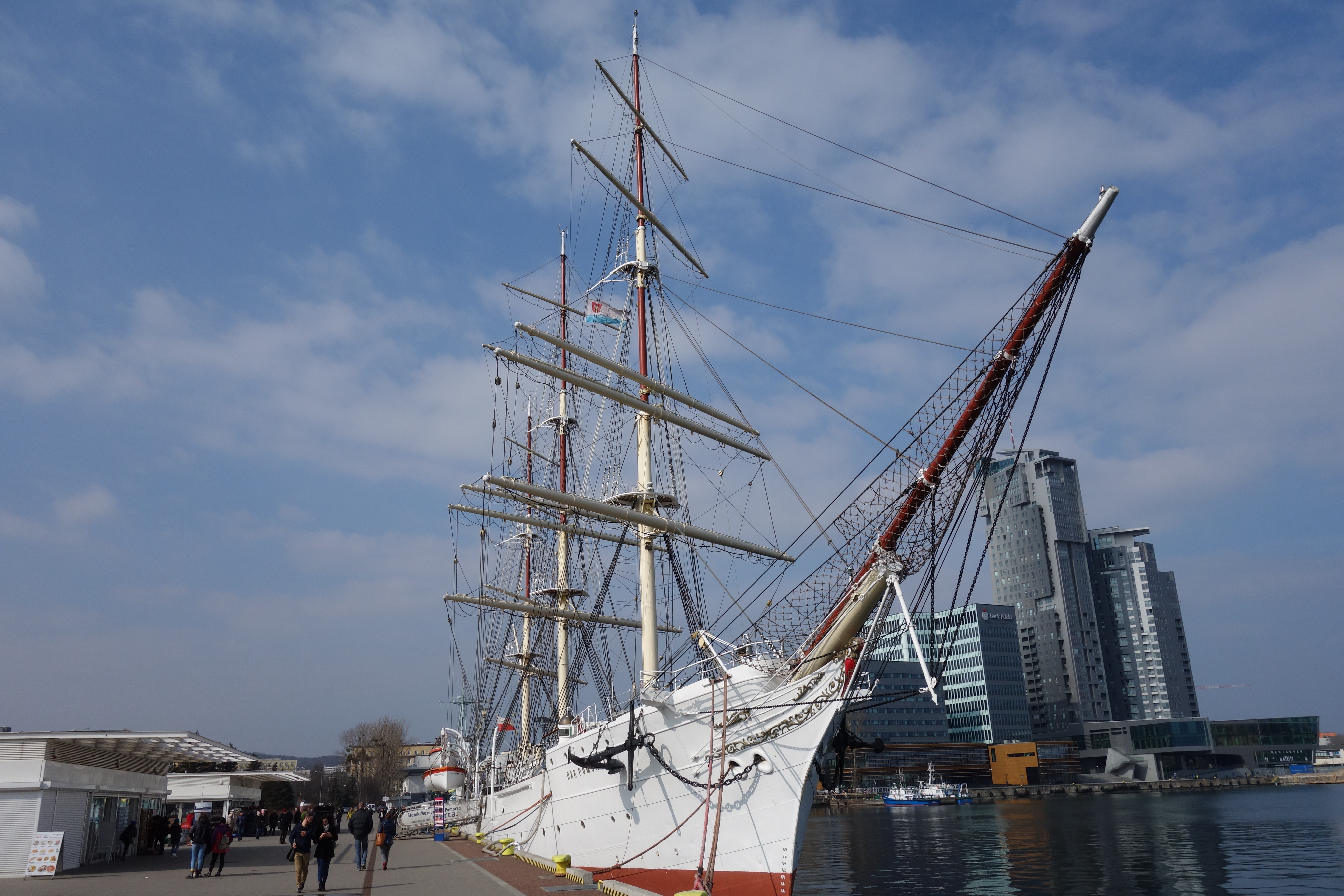 Dar Pomorza, Gdynia 2018